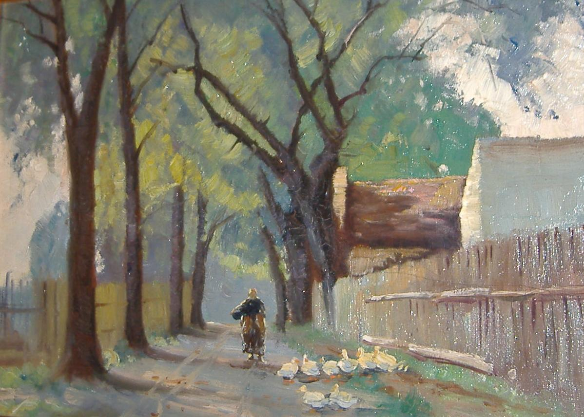 Bäuerin mit Gänsen